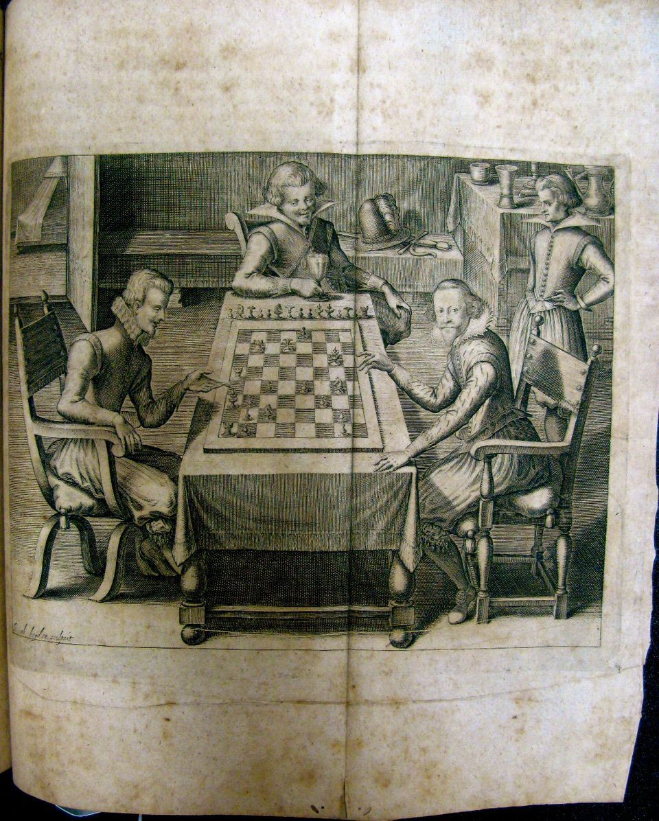 Jacob van der Heyden, род. 1572, Мехелен или 1573, Страсбург — ум. 1636, Страсбург или 1645, Брюссель. Гравюра-иллюстрация к книге